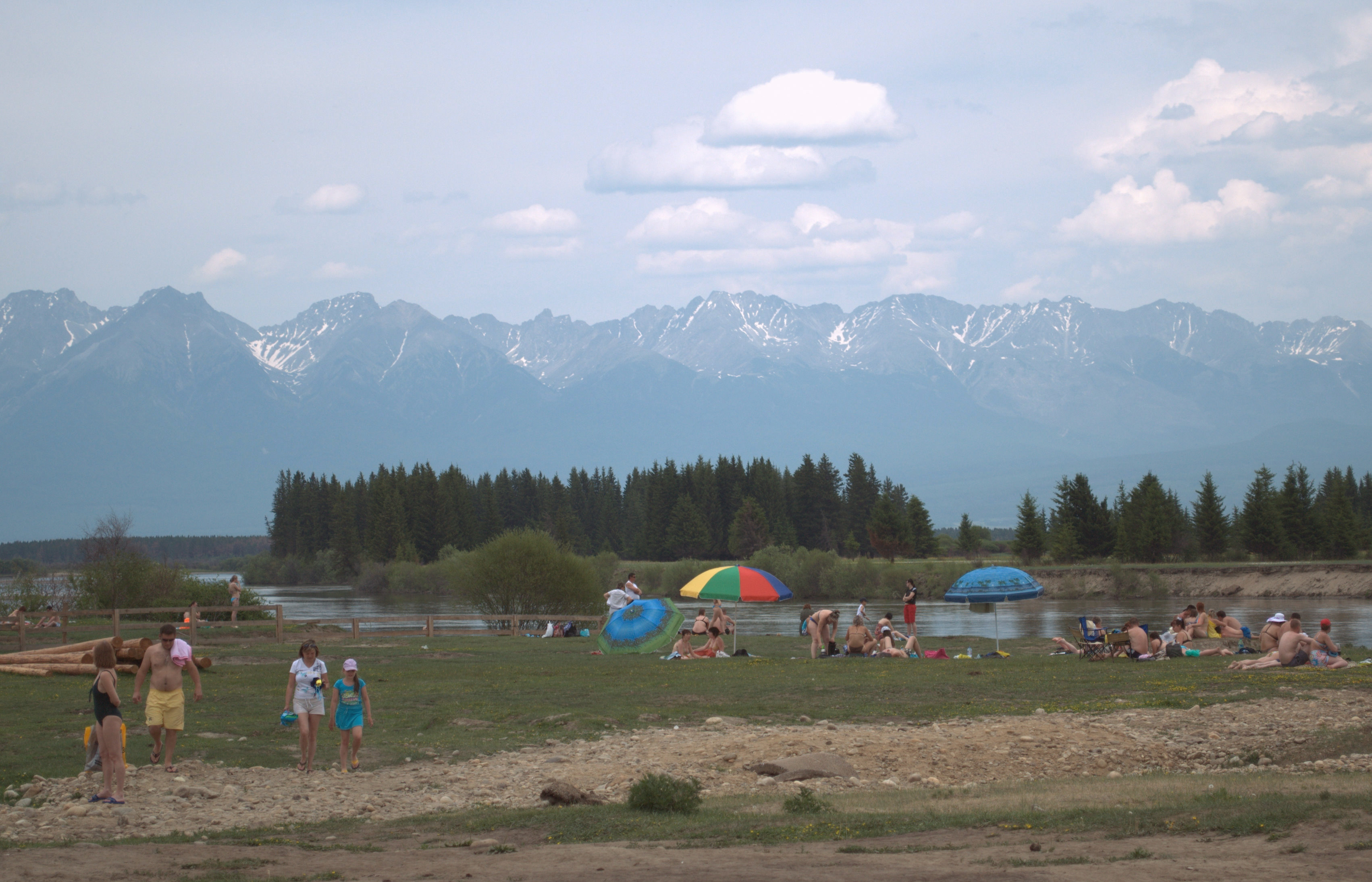 Берег реки Иркут. Курорт Жемчуг, Тункинский район, Бурятия